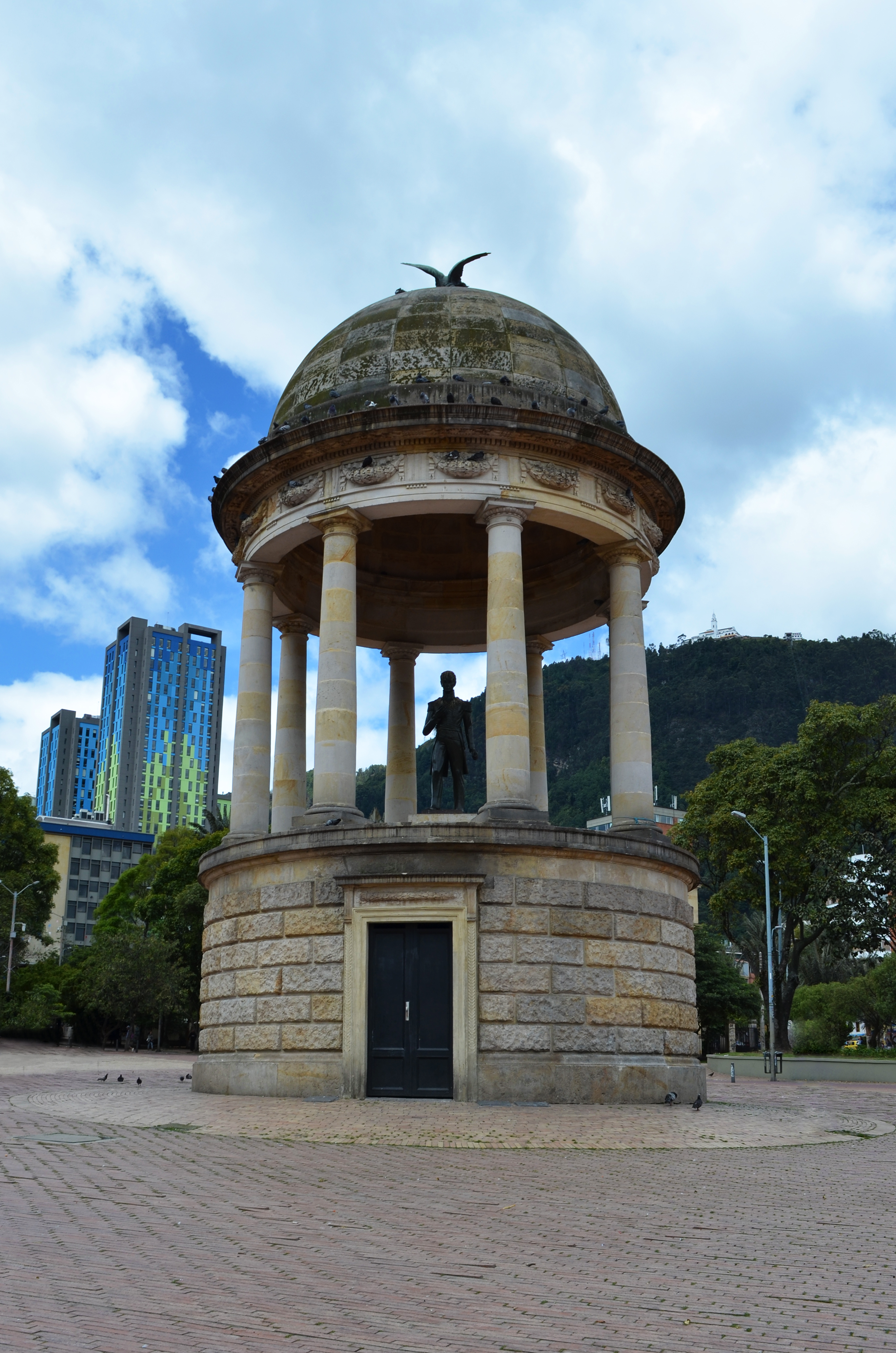 Templete del Libertador